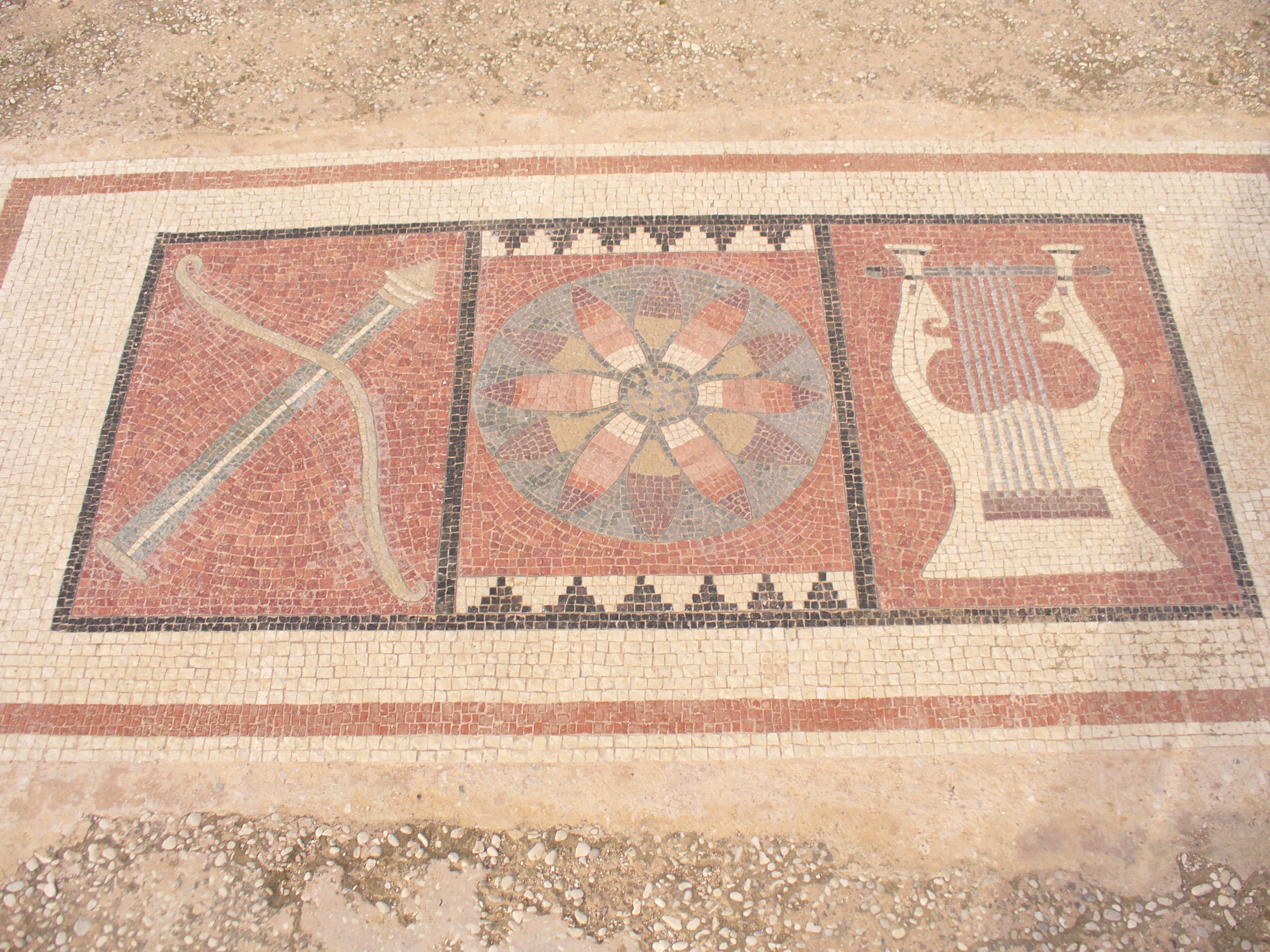 Mosaïque dans le temple d'Apollon au Létoon, près de Xanthus en Lycie.